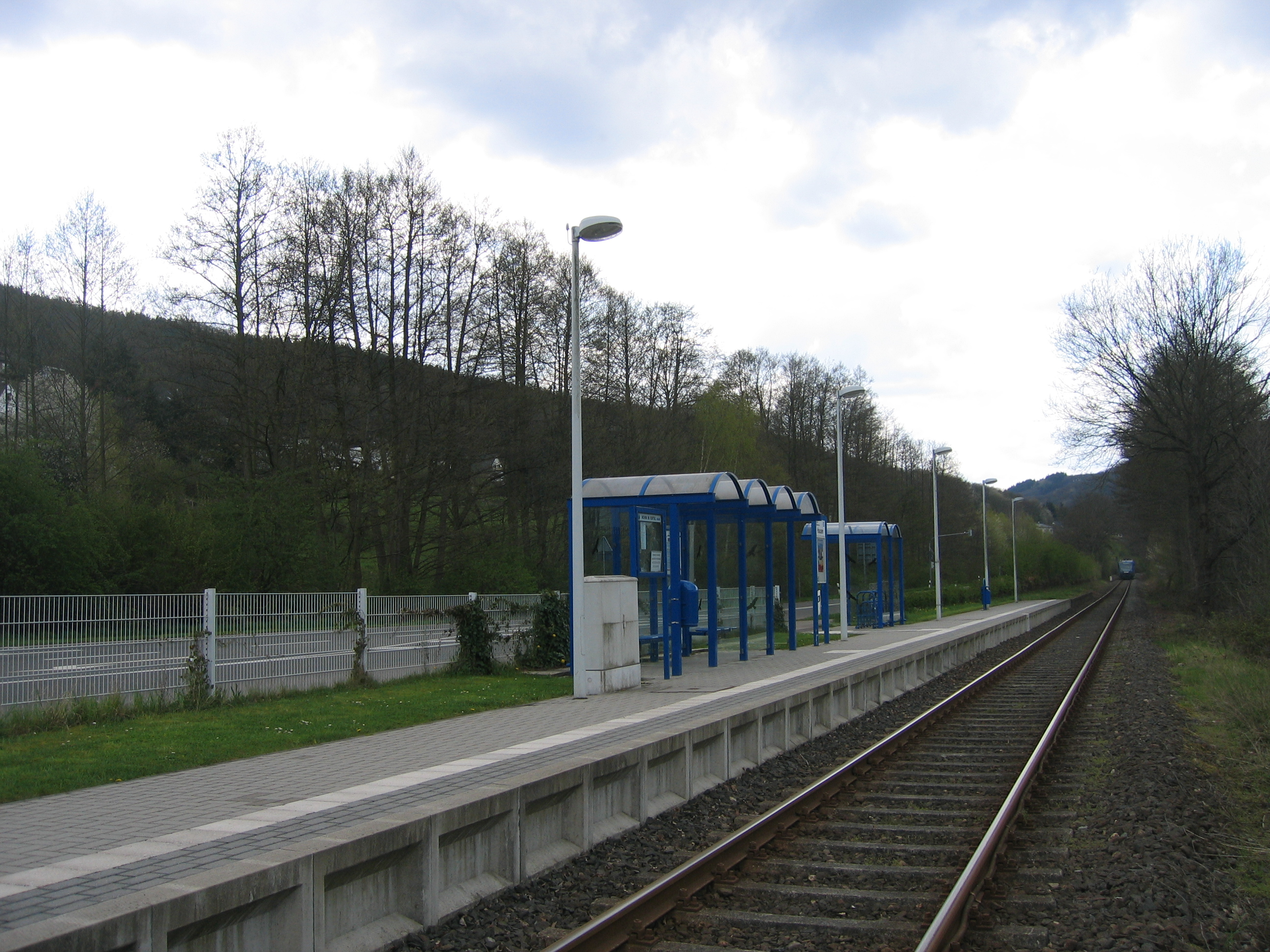 Haltepunkt Hausen an der Bahnstrecke Düren–Heimbach.